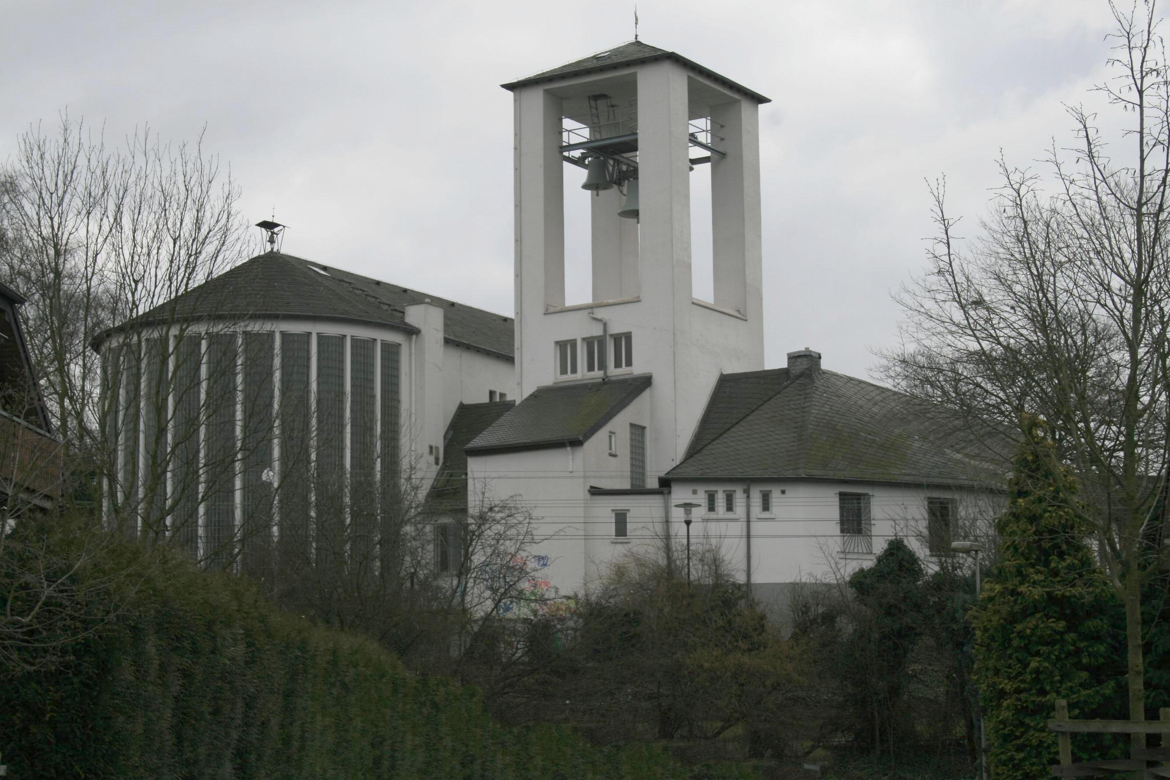 Kath. Pfarrkirche St. Johannes Baptist in Hünshoven